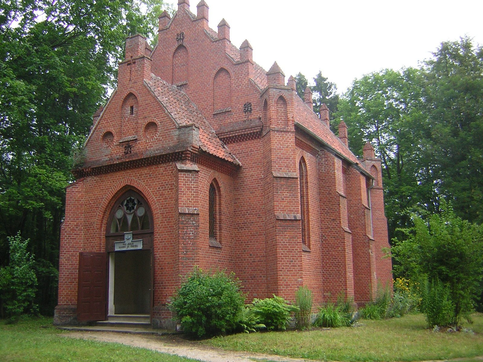 Kapliczka w Glotowie